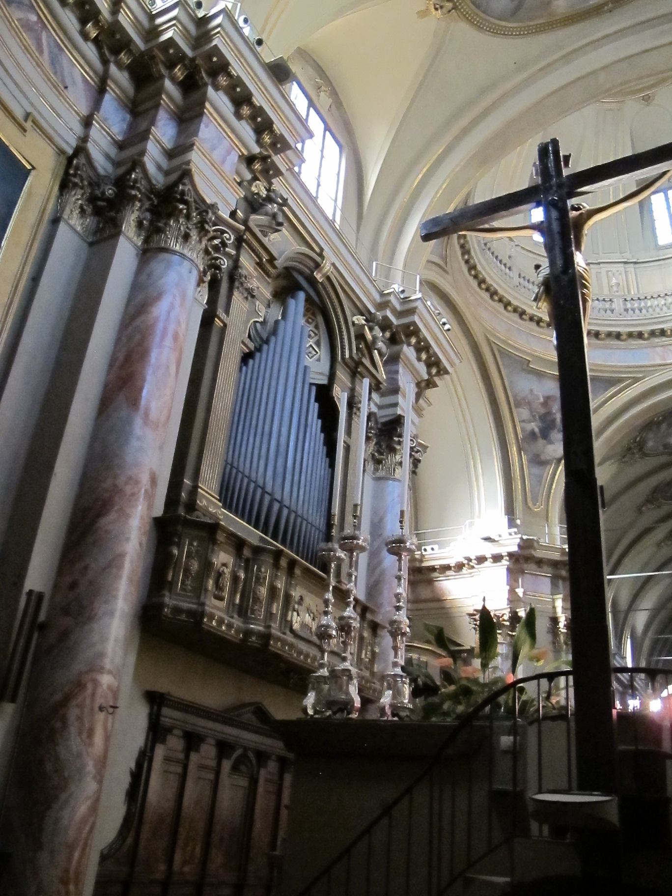 L'organo in Cornu Epistolae